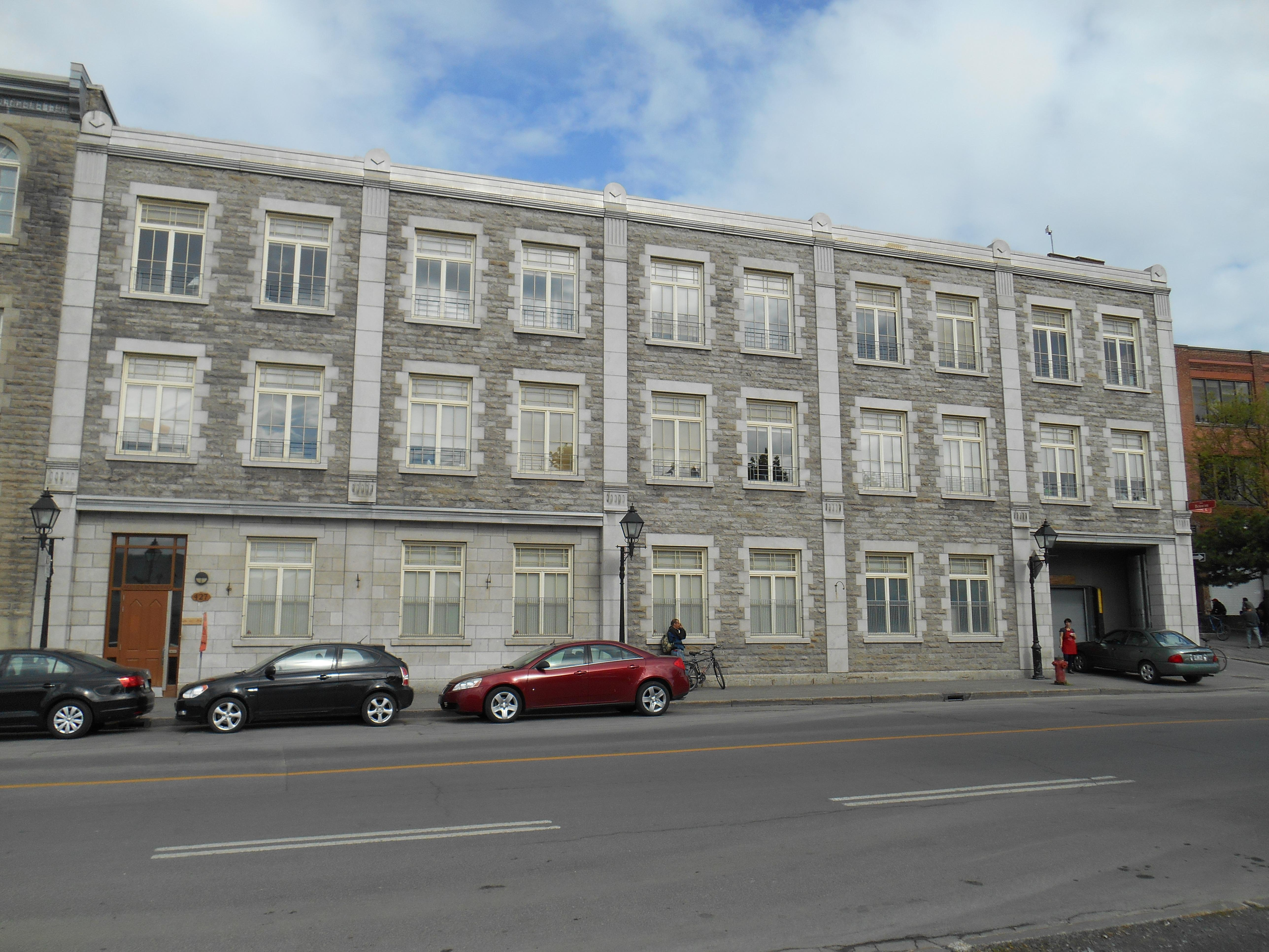 Accueil Bonneau (autre appellation : Nouvel Accueil Bonneau), 427, rue de la Commune Est / rue Bonneau (façade latérale sans numéro civique), Montréal « Cet immeuble a été démoli suite à une explosion. Un nouveau bâtiment a été construit en 1998. »